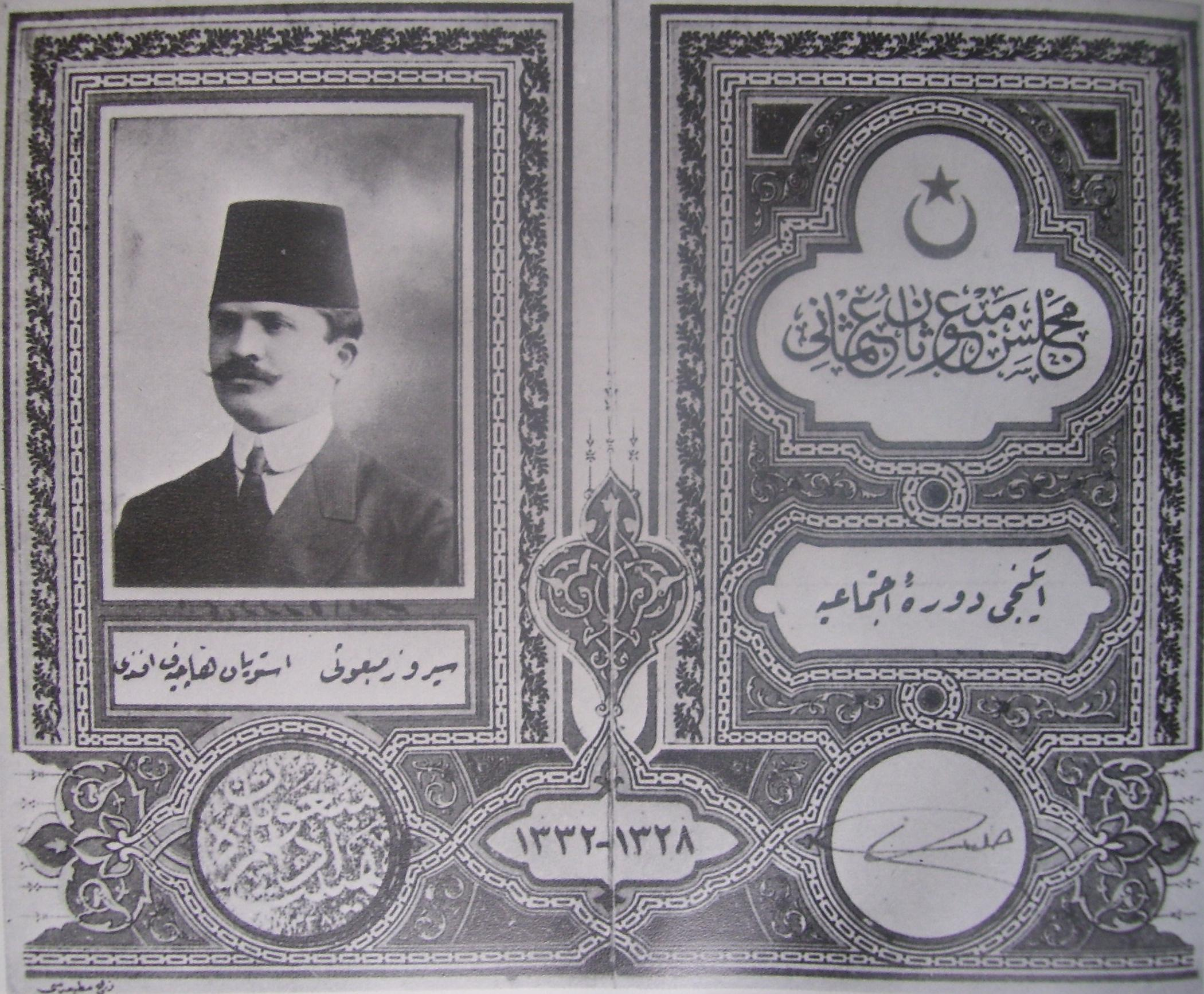 Депутатска карта на Стойо Хаджийски в Османския парламент.